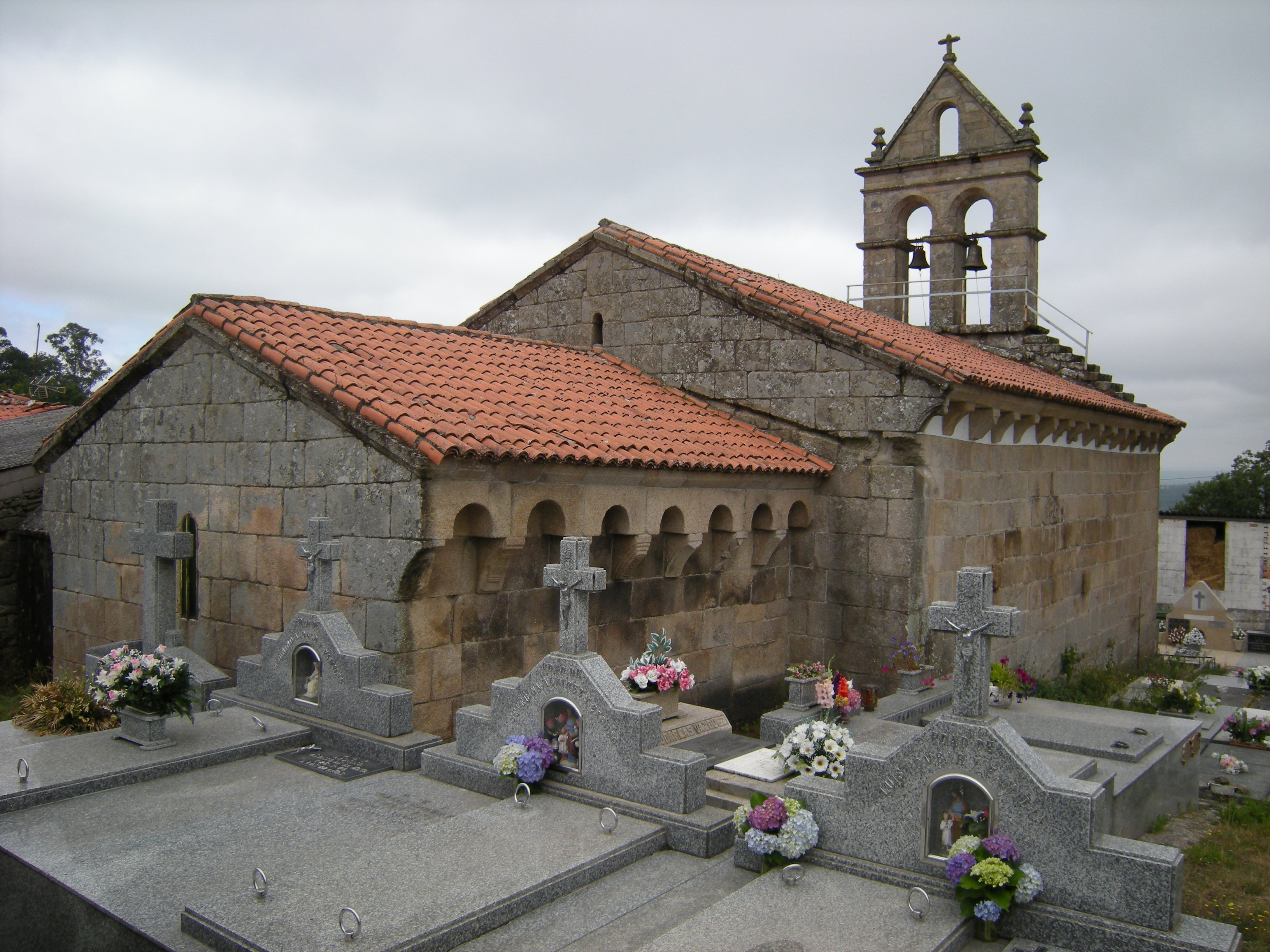 Iglesia de San Cristovo de Armariz